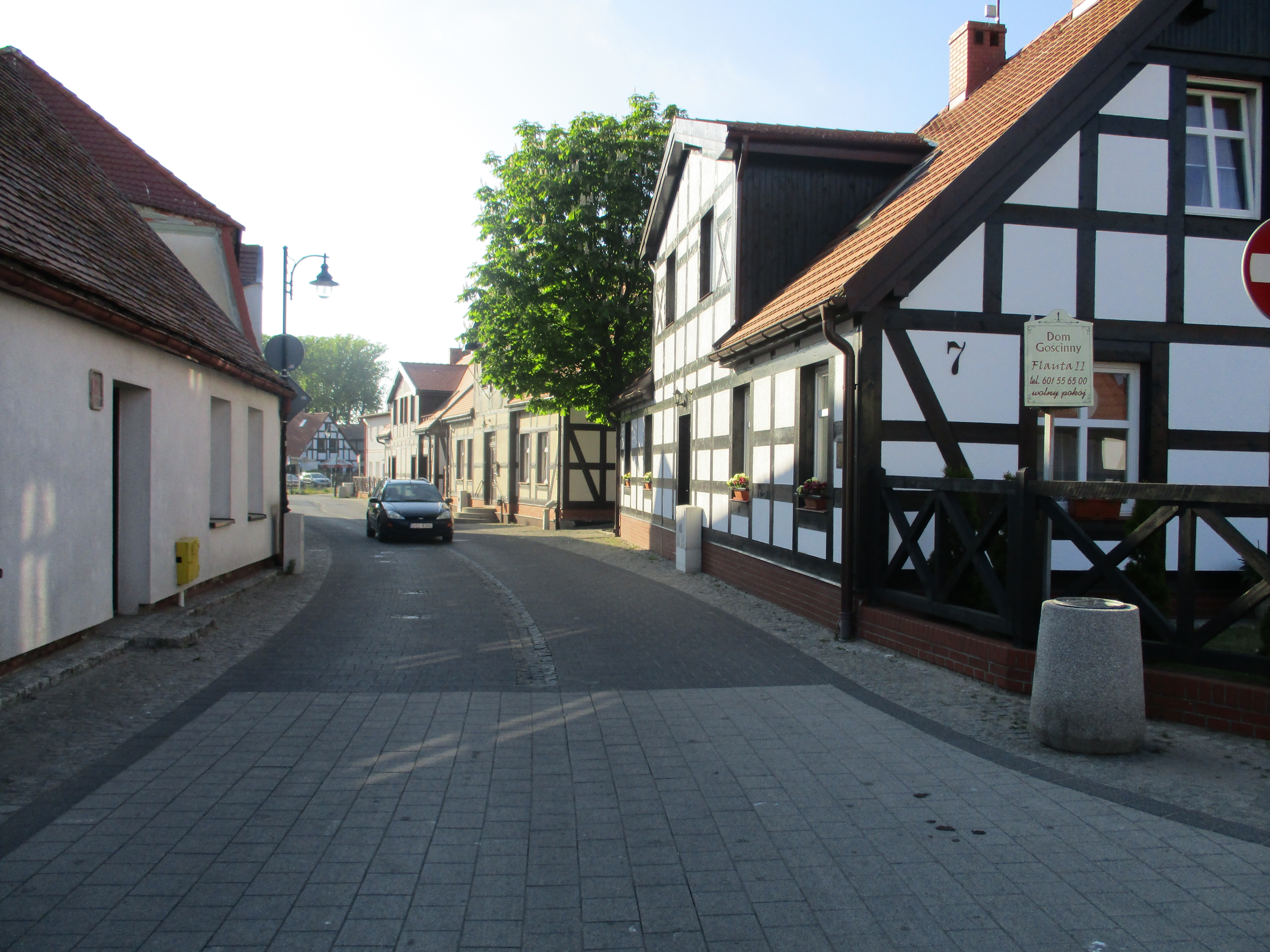 Ustka, ul. Czerwonych Kosynierów